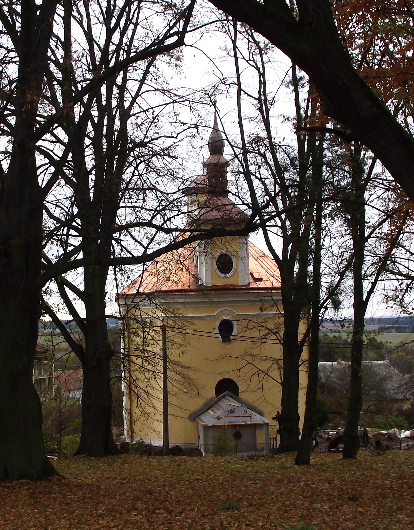 Kostel svatého Jana Nepomuckého, Vyklantice-Staré Vyklantice.